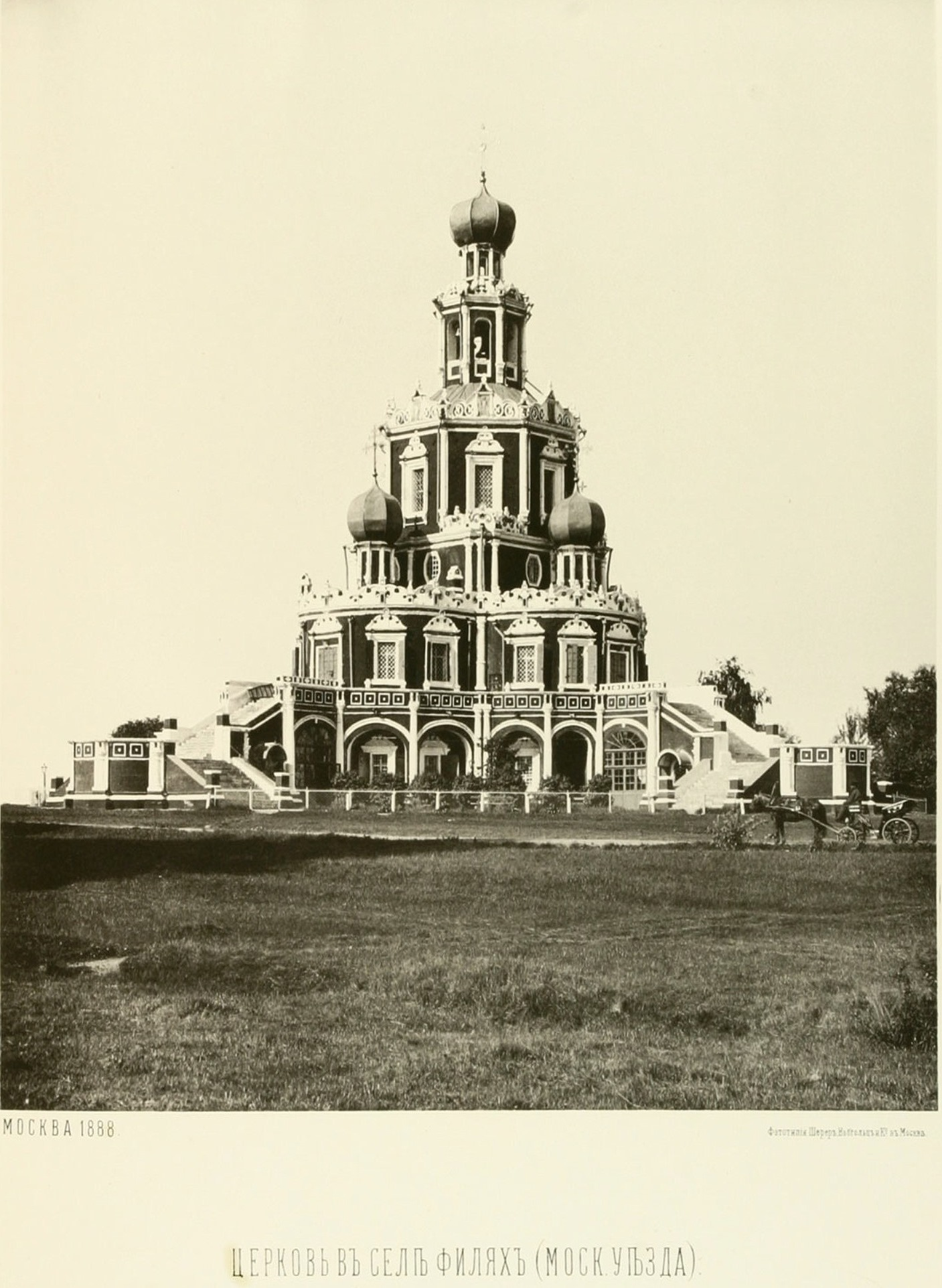 Храм Покрова Пресвятой Богородицы в Филях